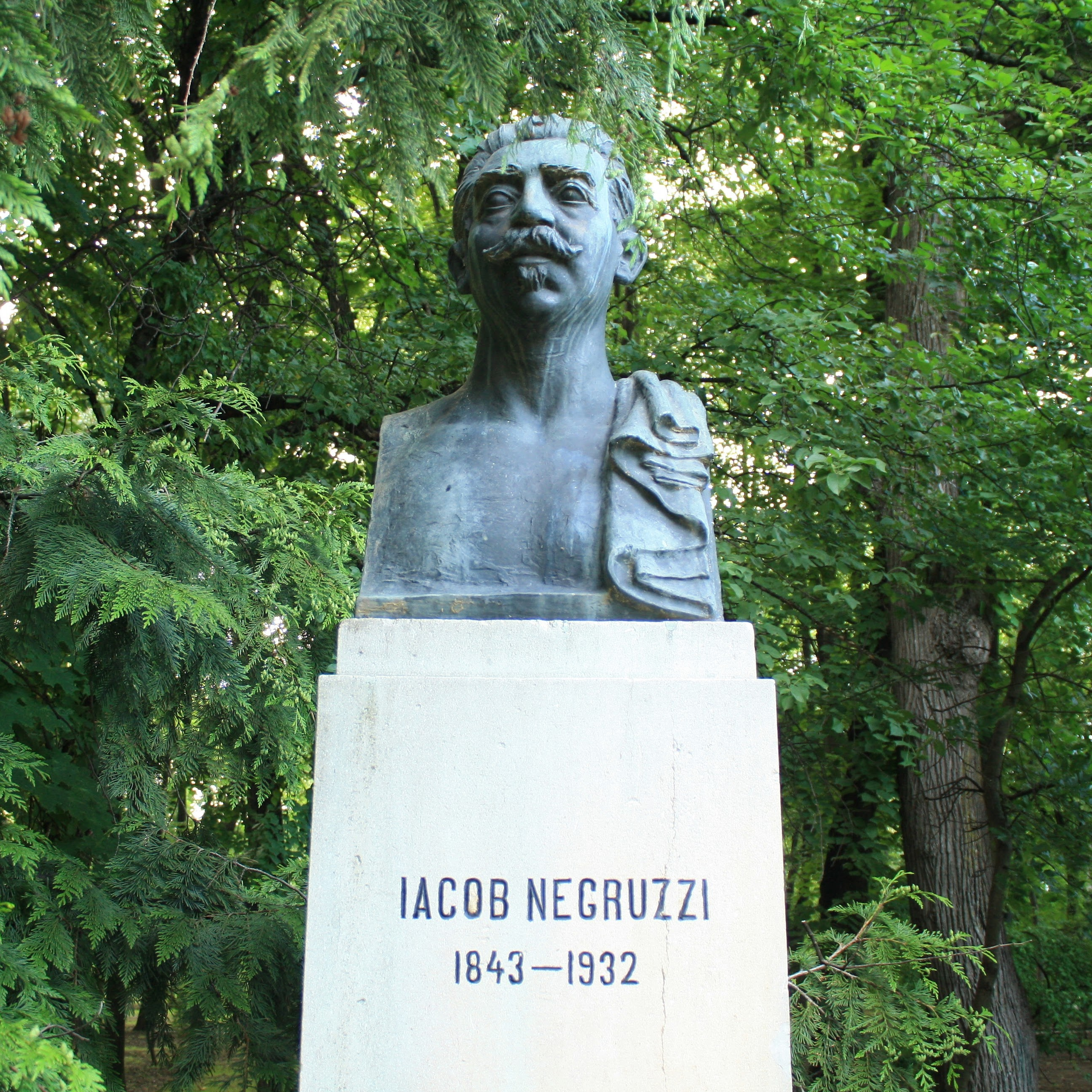 Bustul lui Iacob Negruzzi din Parcul Copou, Iași